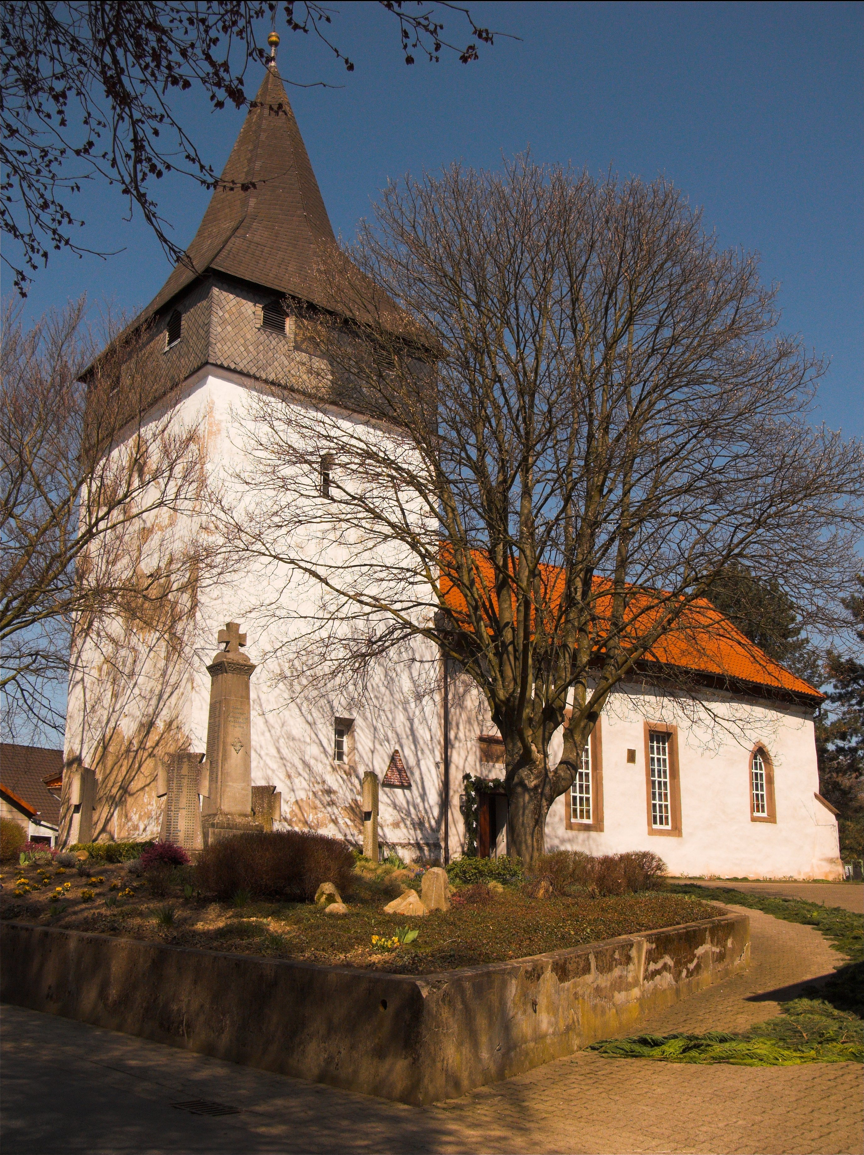 Ev. St. Aegidien Kirche in Wulften am Harz